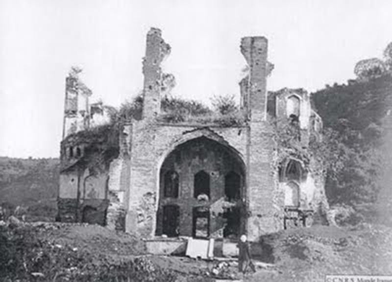 چشمه عمارت از آثار مربوط به دوره صفوی در بهشهر است